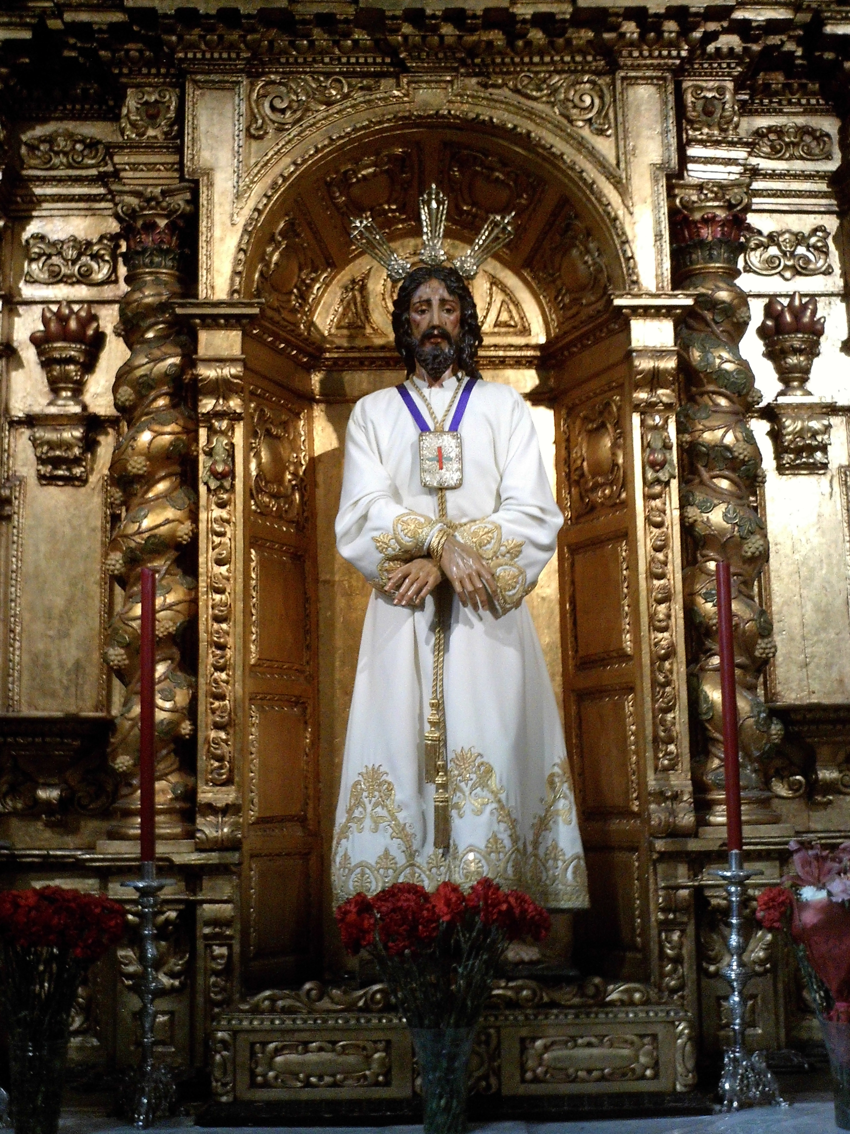 Jesús Redentor Cautivo. José Paz Vélez, 1957. Iglesia de Santiago. Utrera, provincia de Sevilla, Andalucía, España.